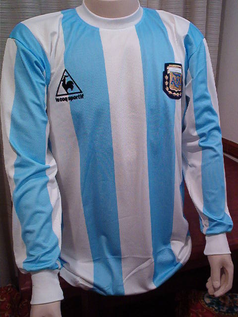 Camiseta de mangas largas usada en el mundial de fútbol de México 1986.